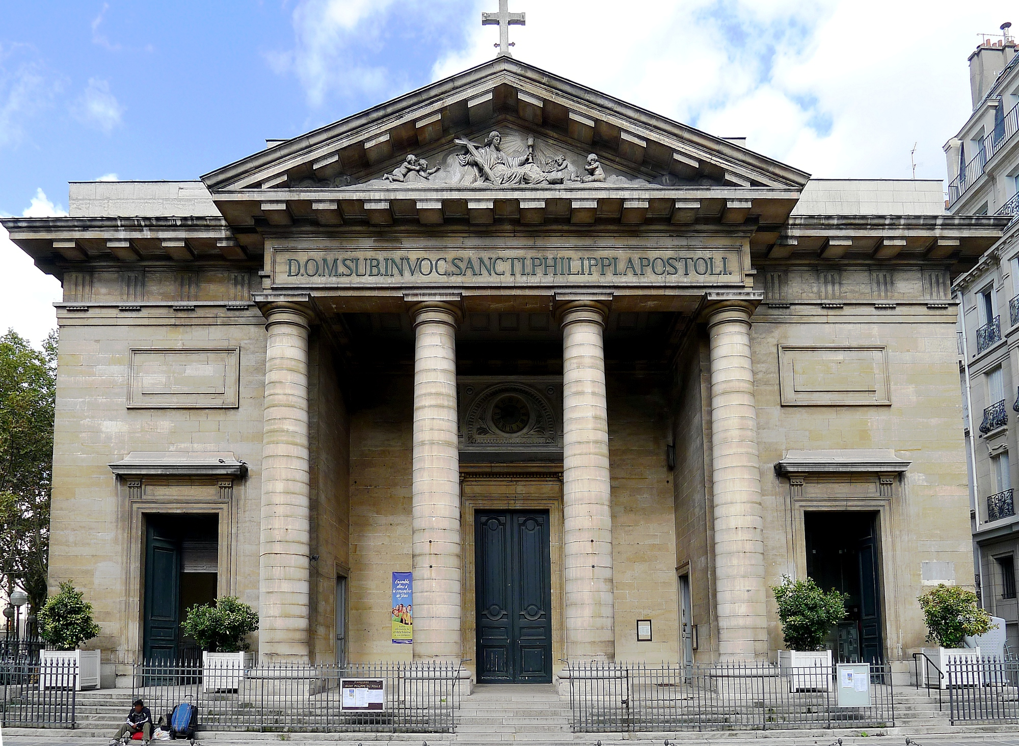 Église Saint-Philippe-du-Roule - Paris VIII